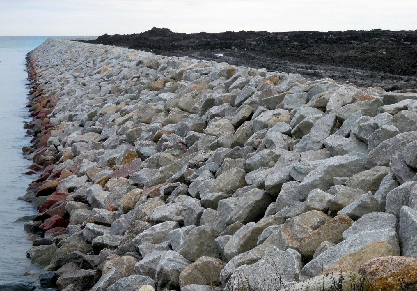 En nyanlagd vågbrytare vid Världens ände i Ystad 2020.